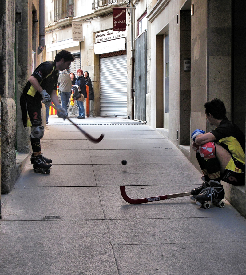 Jugadors d'hoquei al Lip dub per la independència de Vic del 24 d'octubre del 2010.